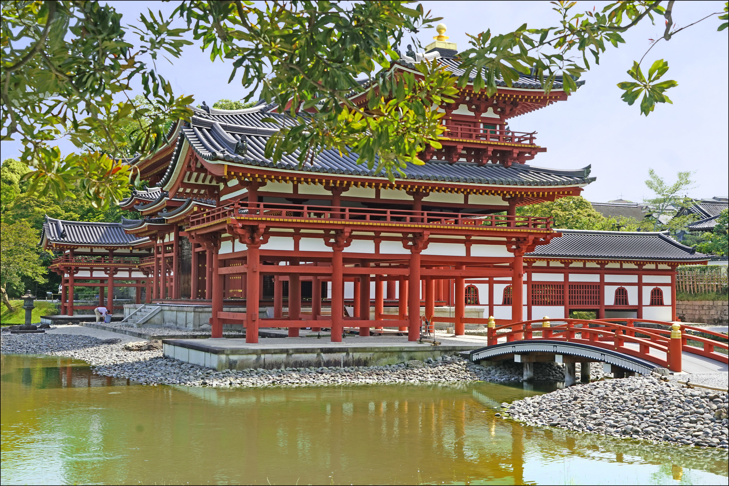 Le pavillon du Phénix (Hoodo) au centre du temple Byodoin d'Uji, à proximité de Kyoto, est consacré au Bouddha Amida. C'est un des chefs-d'oeuvre architecturaux de la période Heian, il a été créé à l'initiative du clan Fujiwara. Le bâtiment qui se reflète dans un étang est la représentation en trois dimensions du palais d'Amida dans "la Terre Pure de l'Ouest". La référence au Phénix est liée aux animaux en bronze qui couronnent le toit et à la forme du bâtiment comportant deux ailes. (ref : l'art bouddhique, Gilles Beguin, CNRS Éditions, Paris, 2009.). Le jardin qui entoure le temple évoque le paradis des Terres Pures du Bouddha Amida. La salle du Phénix abrite une statue d'Amida en bois doré (sculpteur : Jocho) datant de 1053. Sa photographie est interdite. Les murs du temple sont recouverts de peintures dont la "descente d'Amida sur un nuage, en cortège entouré de bodhisattava et de musiciens", venant chercher un défunt pour qu'il renaisse dans la Terre Pure de l'Ouest. le site officiel du temple et du musée Fujiwara no Yorimichi (992-1074), fils de Fujiwara no Michinaga, est le fondateur de la salle du phénix du Byodoin de Uji qui a été consacrée en 1053. (extrait de Wikipedia)